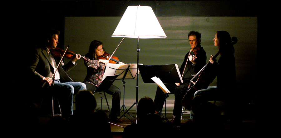 Rosamunde-Quartett am Käthe-Kollwitz-Gymnasium in München Neuhausen-Nymphenburg